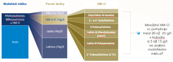 Vytvorené a upravené podľa: Zivkovic AM, German JB, Lebrilla CB, Mills DA. Human milk glycobiome and its impact on the infant gastrointestinal microbiota. PNAS 2011; Suppl(1), vol.108:4653-4658.